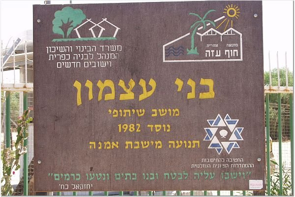 בני עצמון התמונות באדיבות קטיף.נט (קישור) אתר האינטרנט של גוש קטיף. צילם: מוטי סנדר.